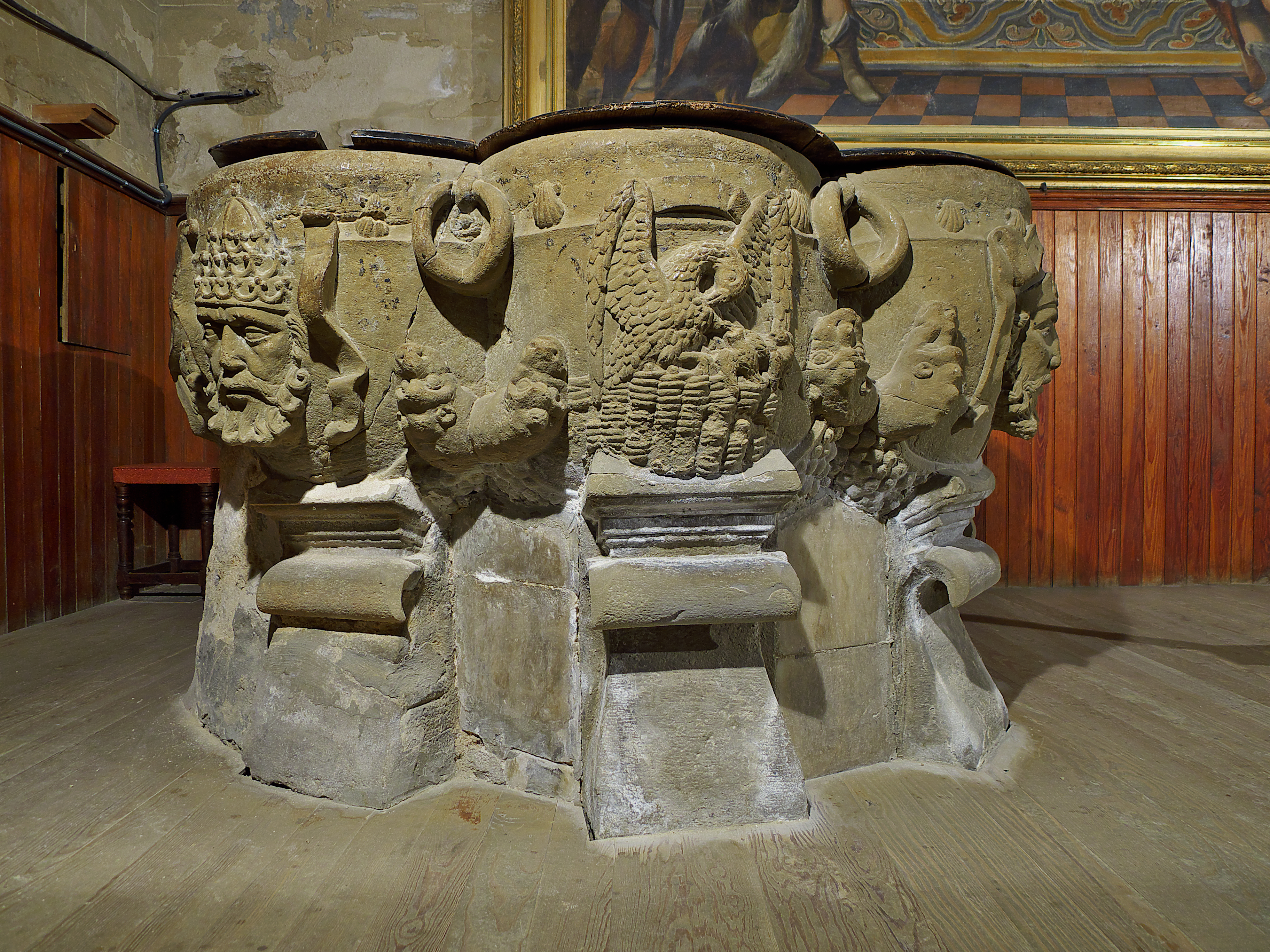 Sorprendente pila bautismal, lobulada, de grandes proporciones y singular decoración.